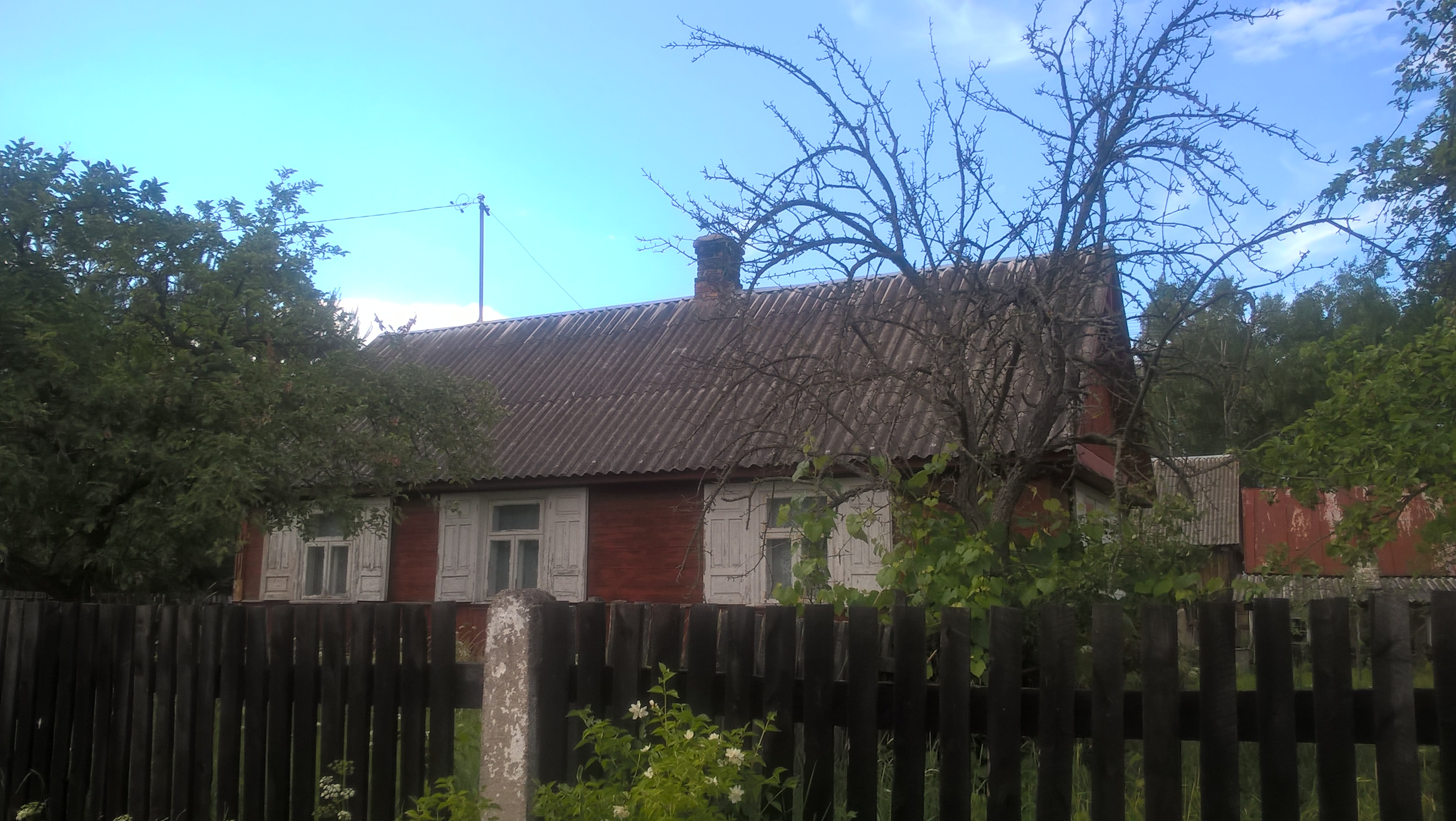 Dom w Olszankach